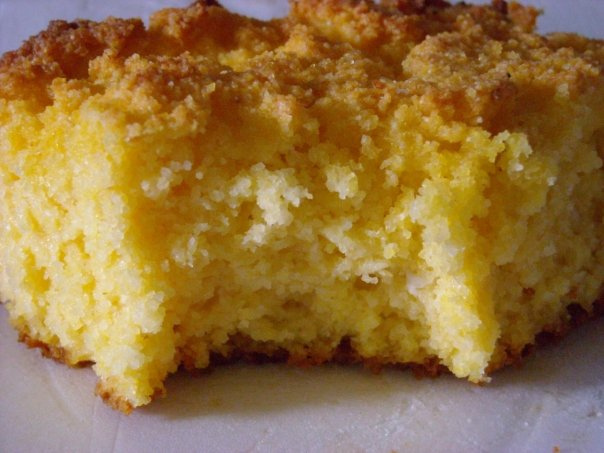 zlatna proja golden proya